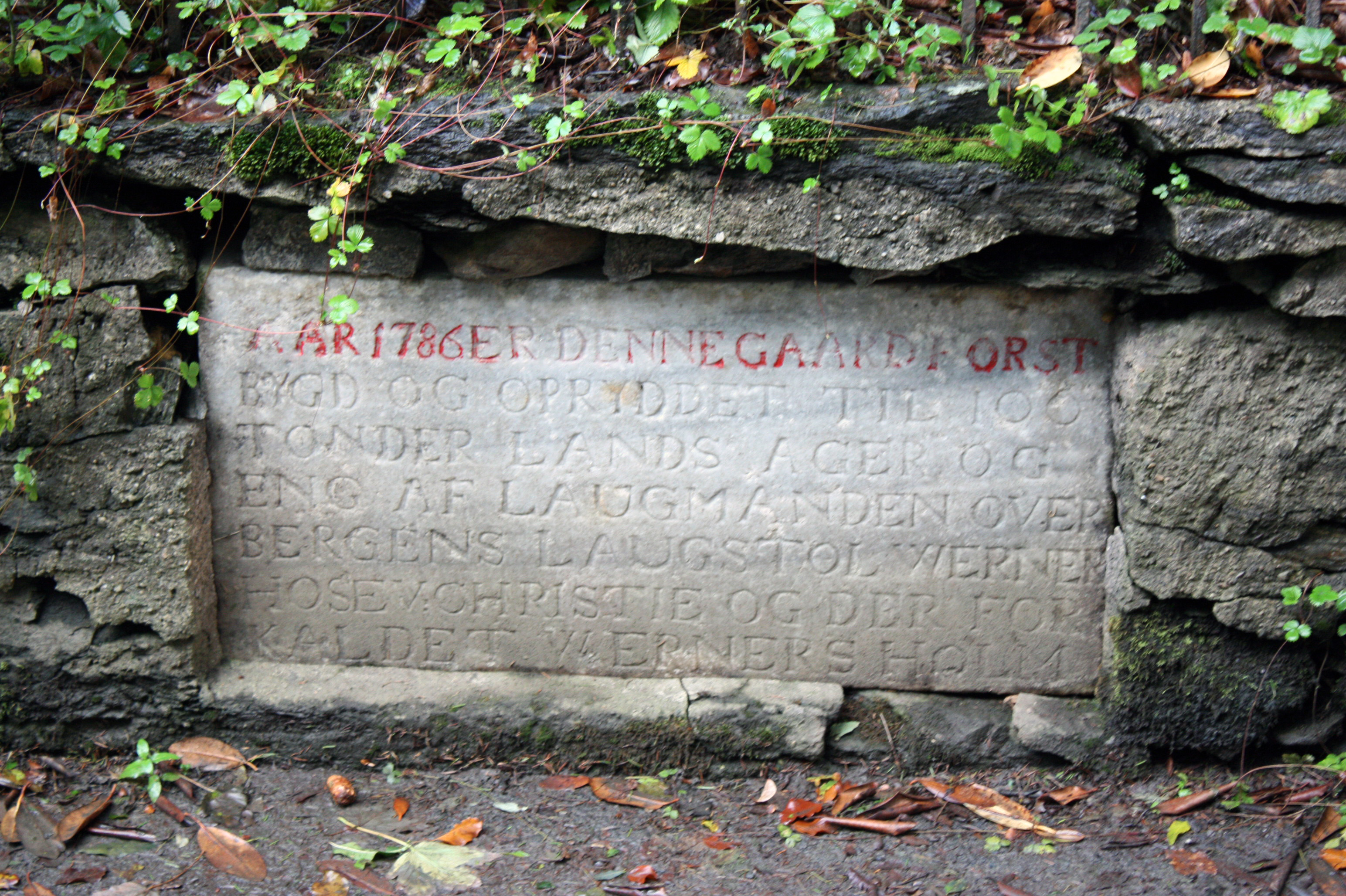 Old inscription at Wernersholm, Fana, Bergen.